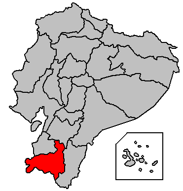 Ubicación de la Provincia de Loja en la República del Ecuador.